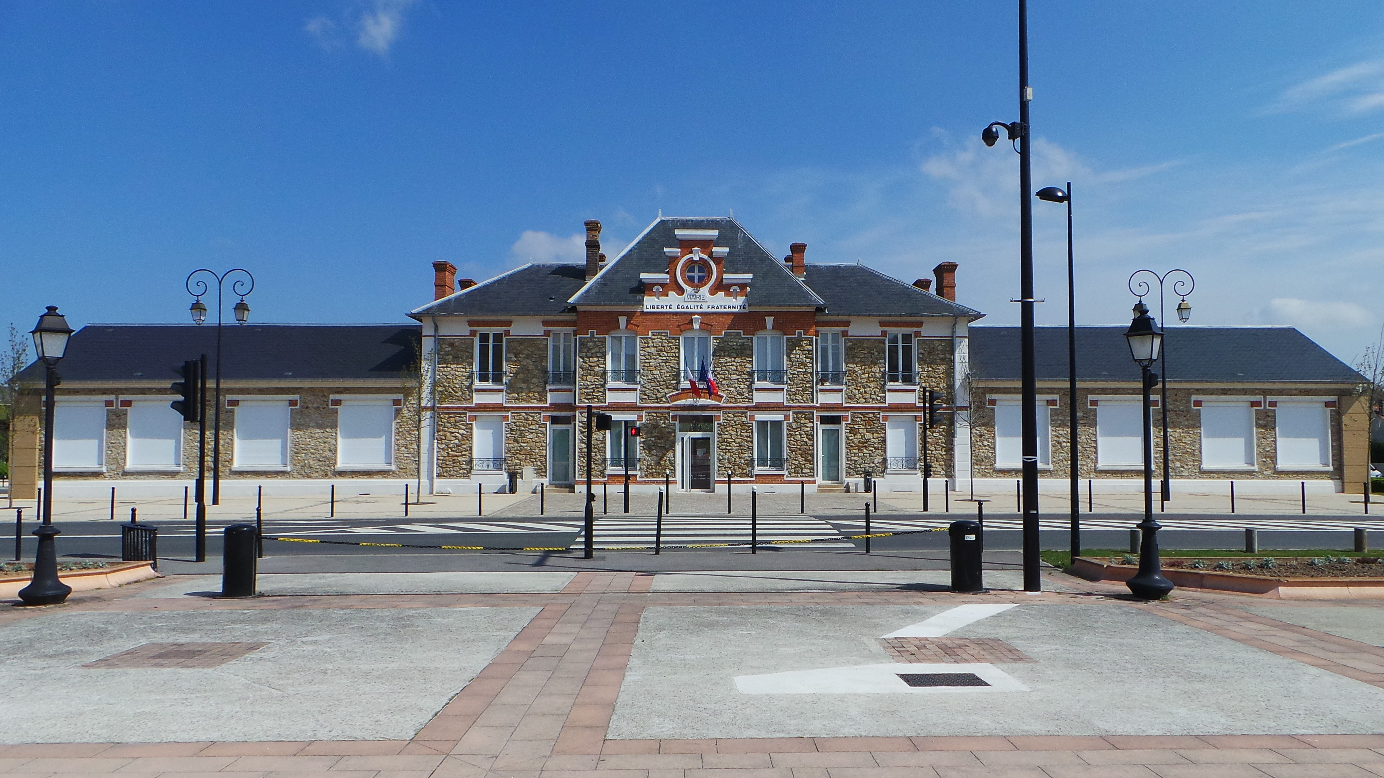 Hôtel de ville du Coudray-Montceaux, Essonne, France